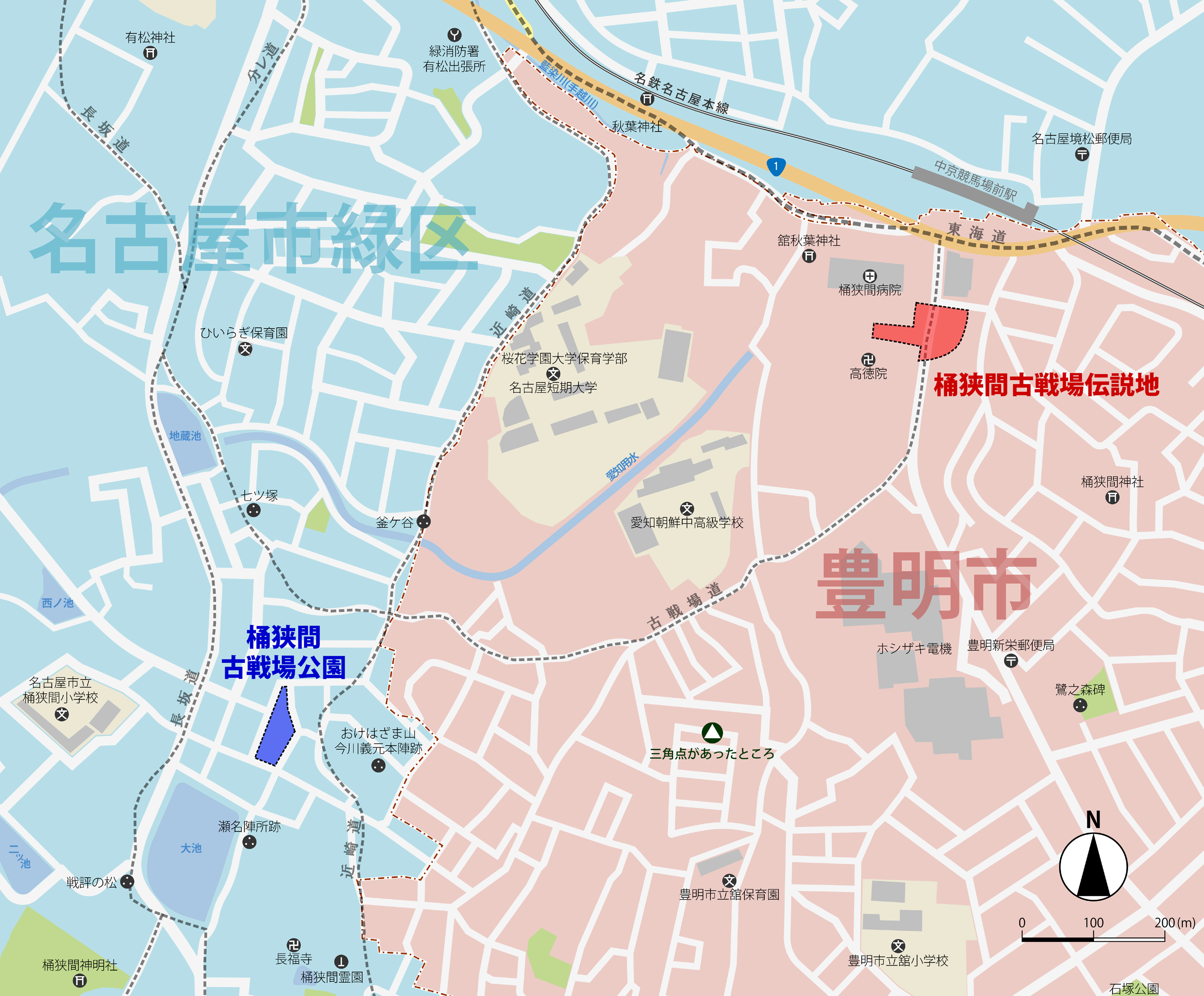 桶狭間古戦場位置図